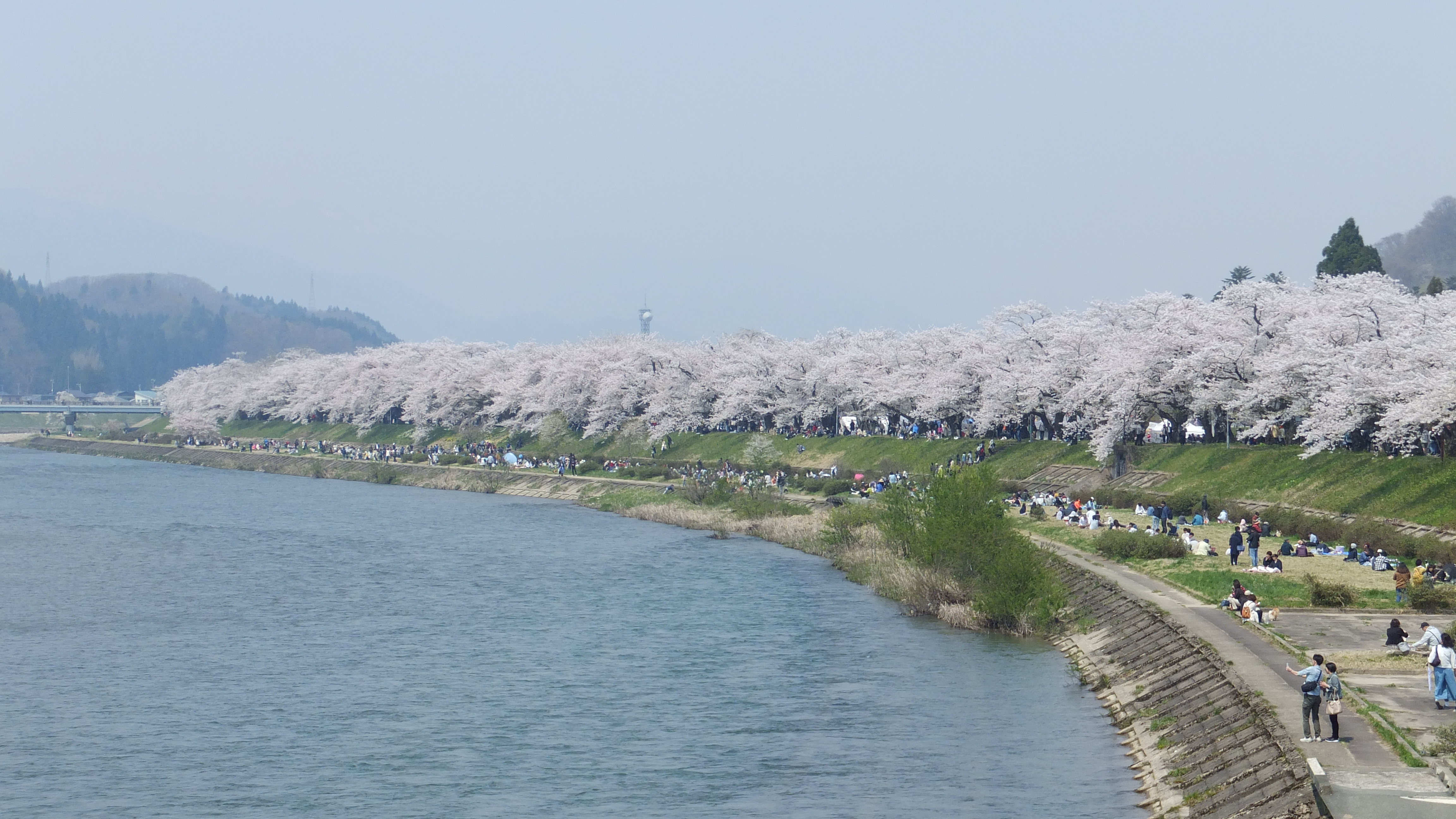 秋田県仙北市角館、桧木内川の築堤にて。ソメイヨシノの並木が約2kmに渡って続き、国の名勝に指定されている。